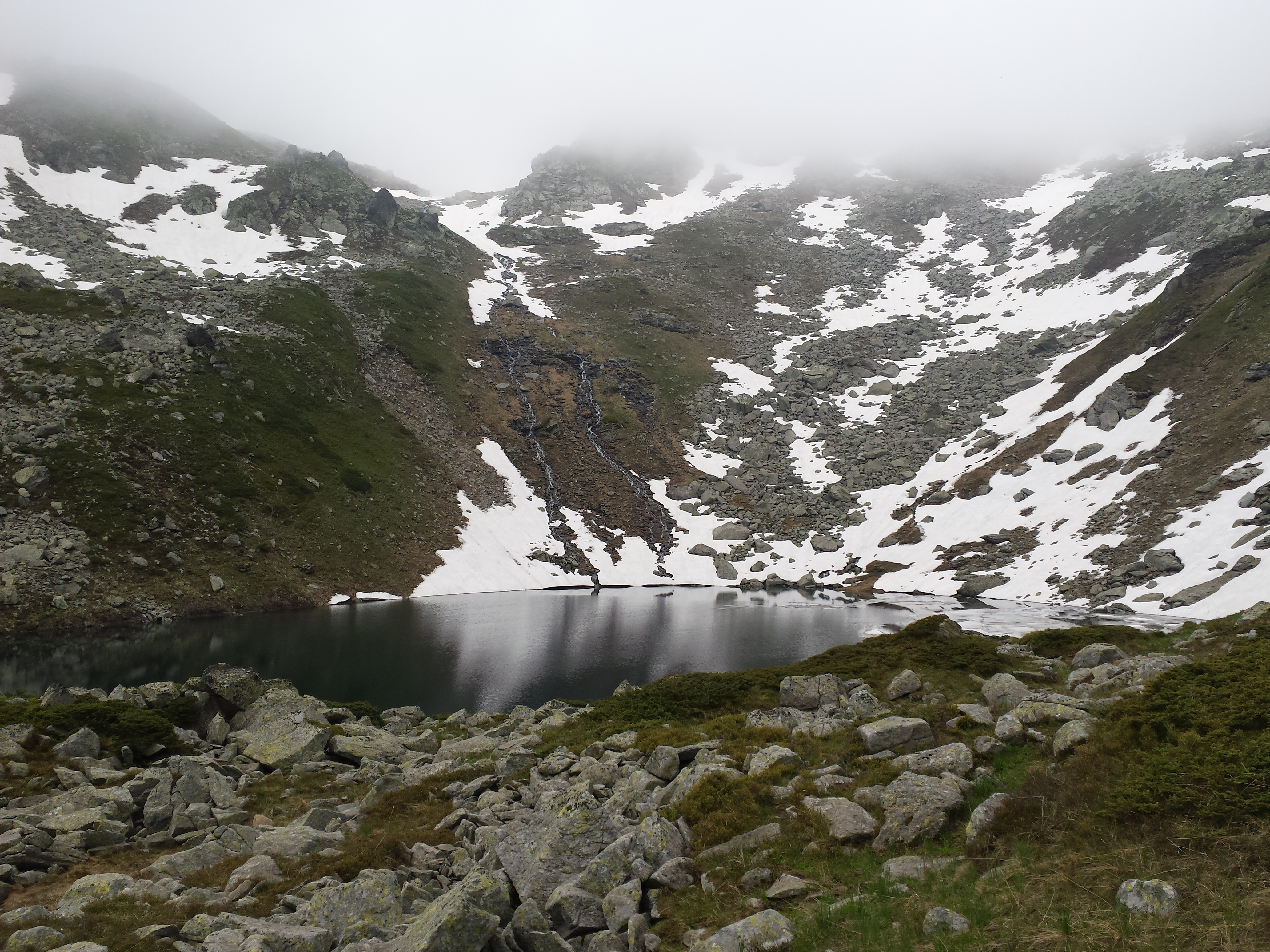 Parku Kombëtar Sharri, Prizren Suharekë Kaçanik Shtërpcë, Dragash